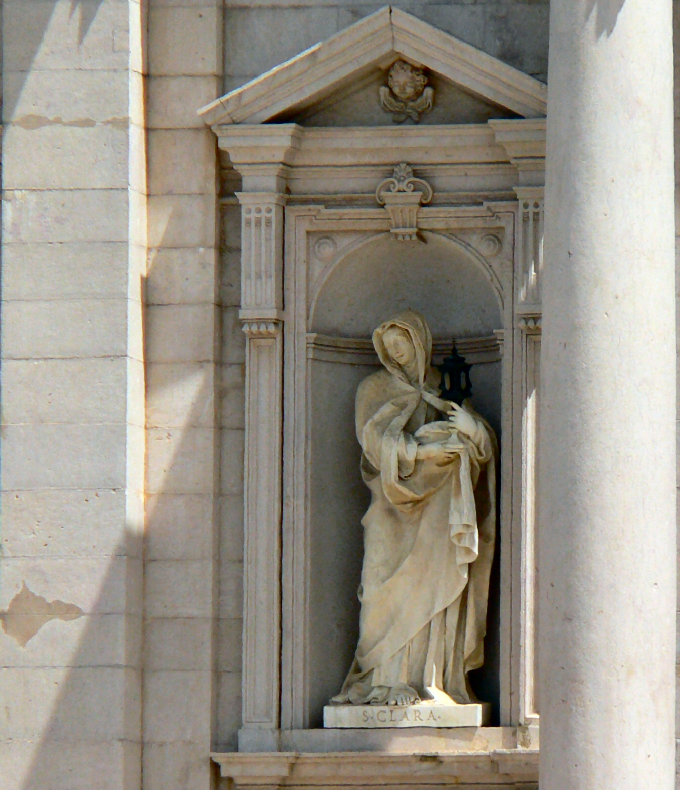 Palácio Nacional de Mafra em Mafra - Estátua de Santa Clara